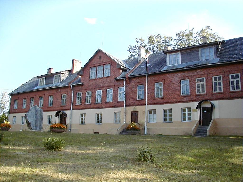 Mārkalnes skola 2002-09-13